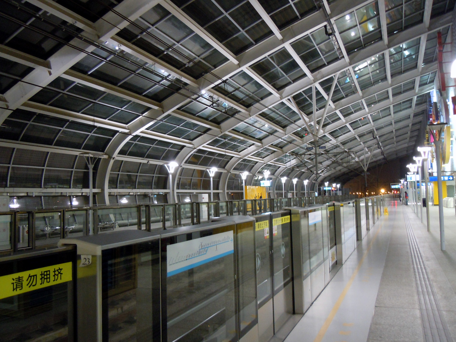 南京地铁小龙湾站站台